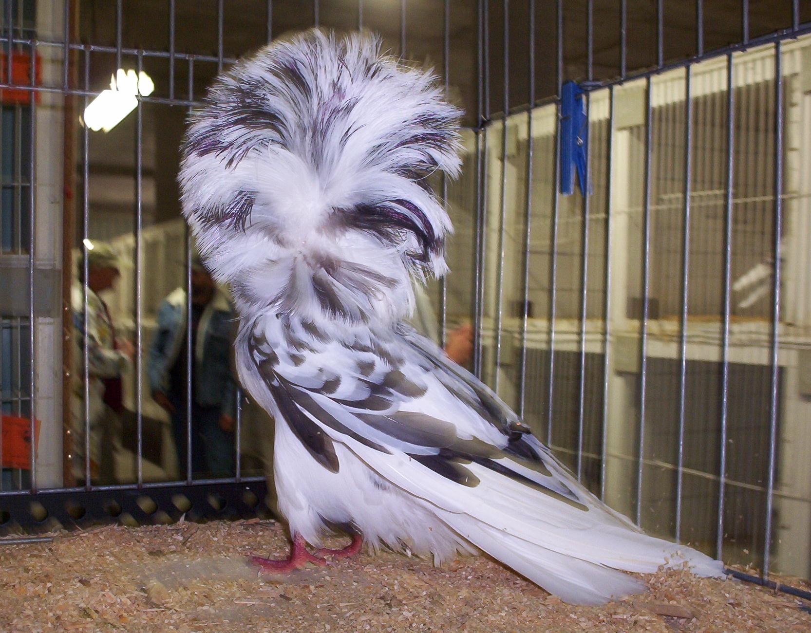 Jacobin Pigeon